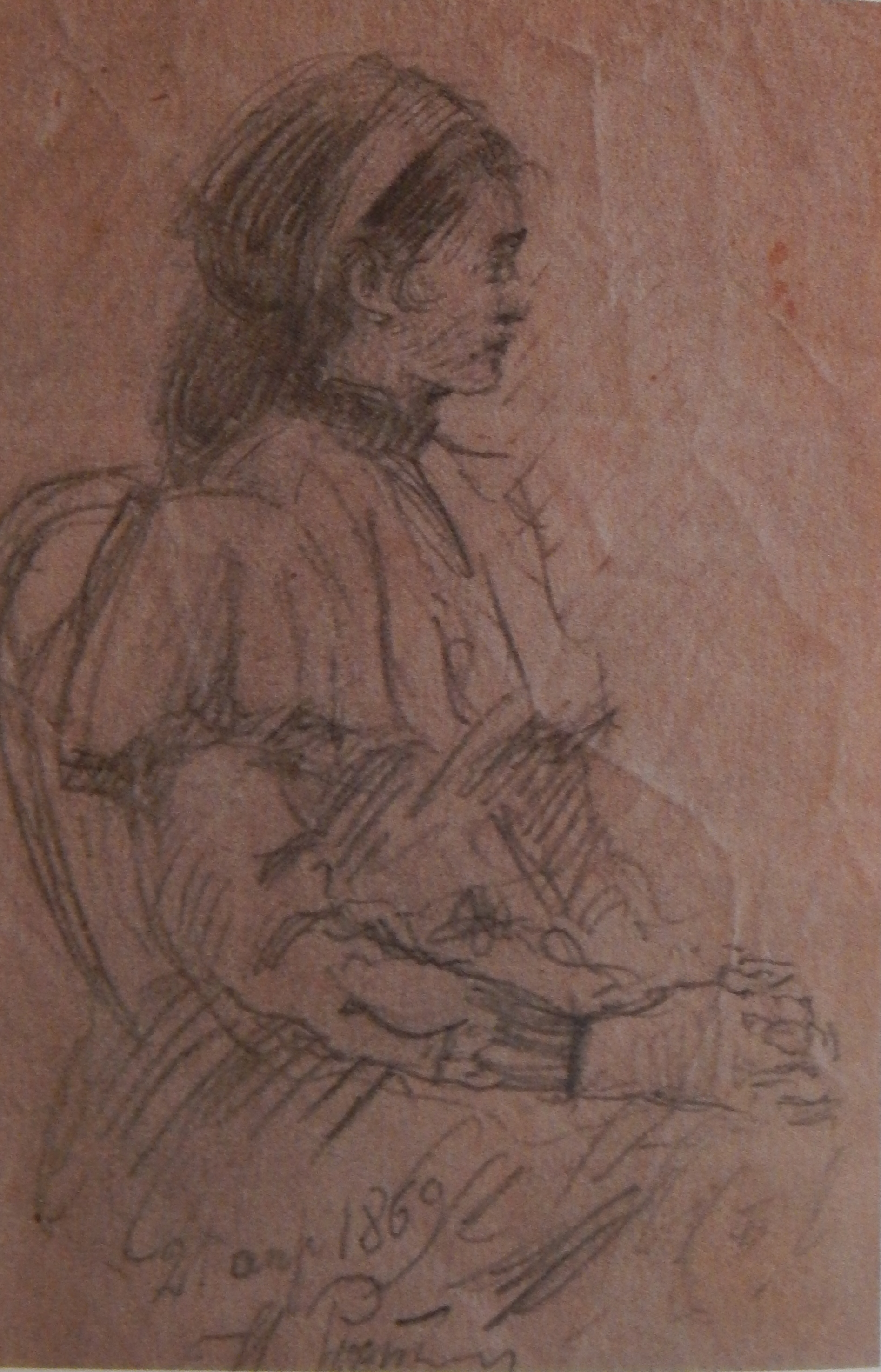 Ілля Рєпін. Малюнок Августини Станіславівни Сінькевич (Габель). 21 квітня 1869 року.